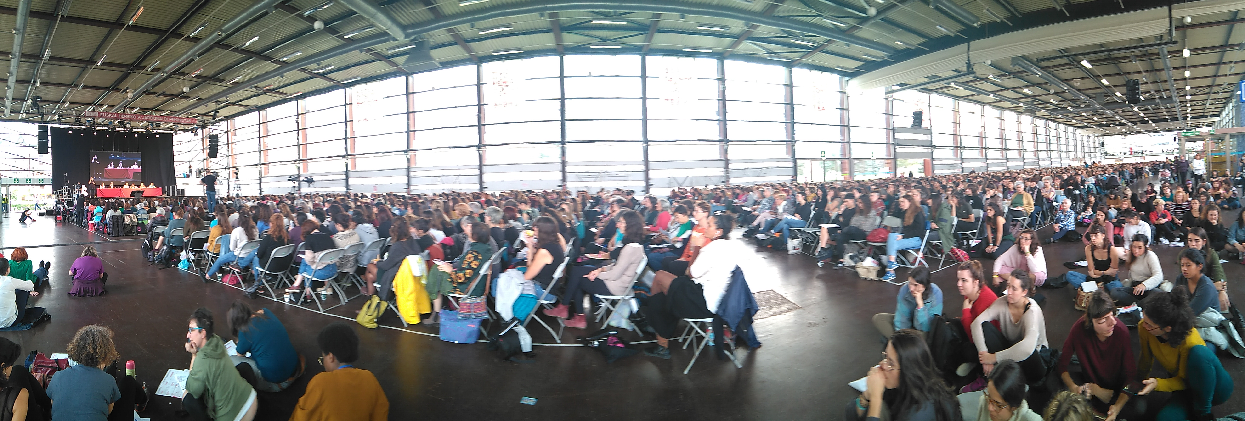 V Jornadas Feministas de Euskal Herria